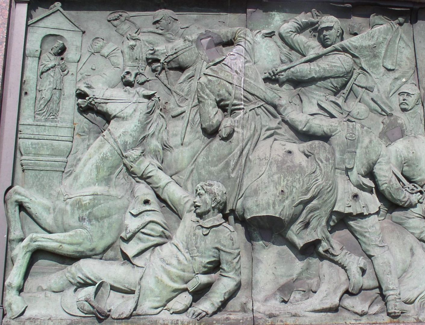 Die Schlacht bei Nachod / Battle of Nachod 1866, links der böhmische Heilige Nepomuk. Er gibt einen Hinweis auf die Hauptaustragungsstätten dieses Krieges. Detail aus dem Relief 1866 von Moritz Schulz an der Berliner Siegessäule